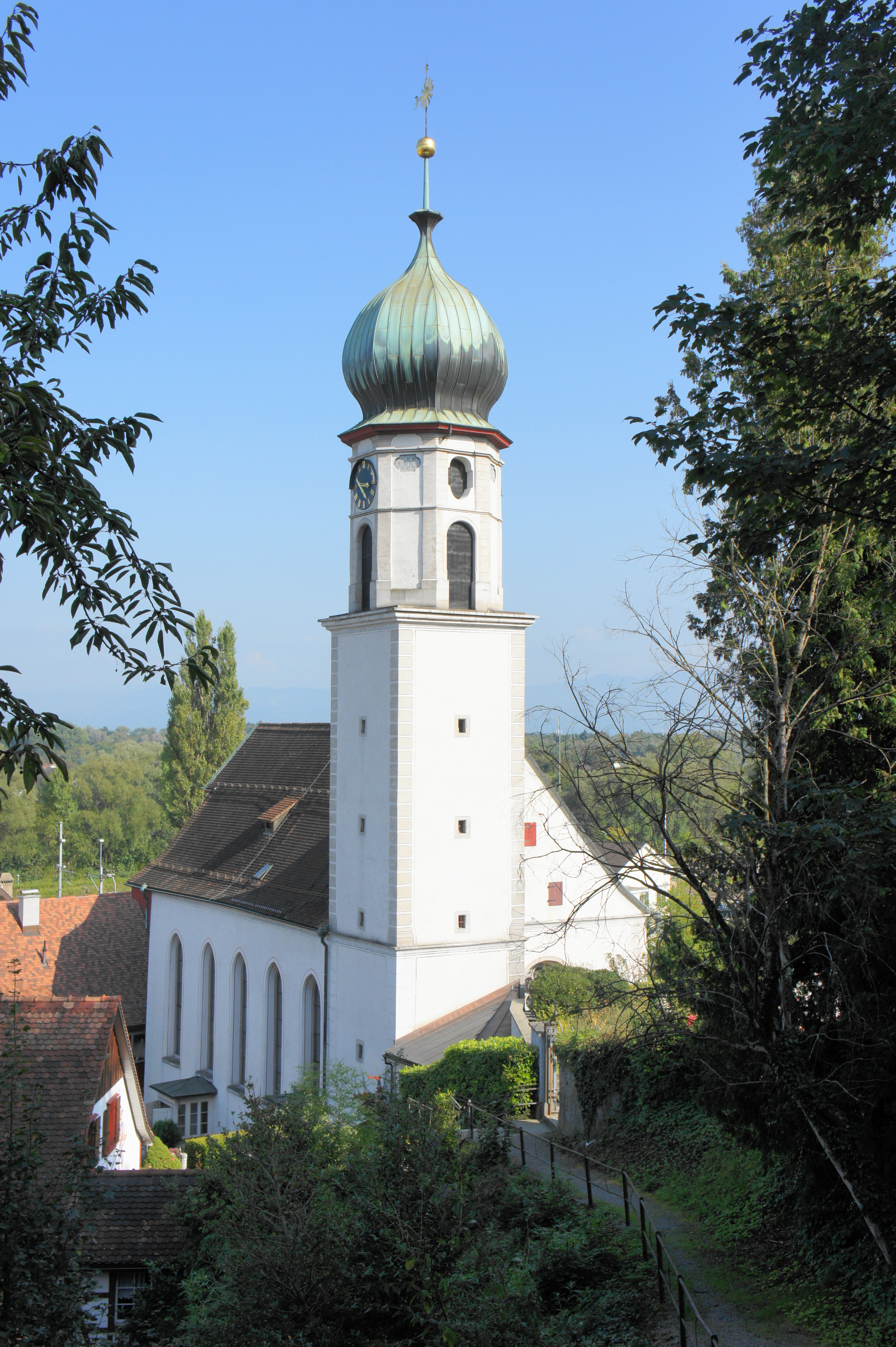 Blick aus Westen auf die ref. Kirche in Rheineck. Der Kirchturm hat ein Zwiebeldach.